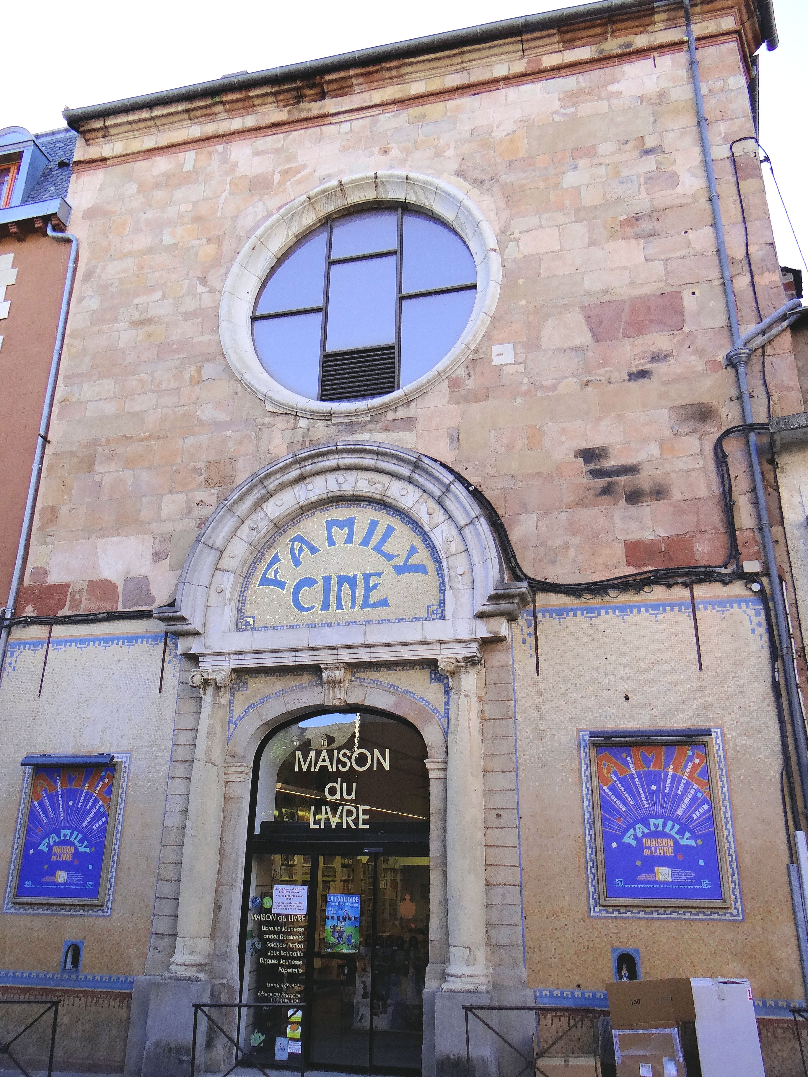 Rodez - Maison du Livre dans l'ancien cinéma Ciné Family, 12 place Charles-de-Gaulle